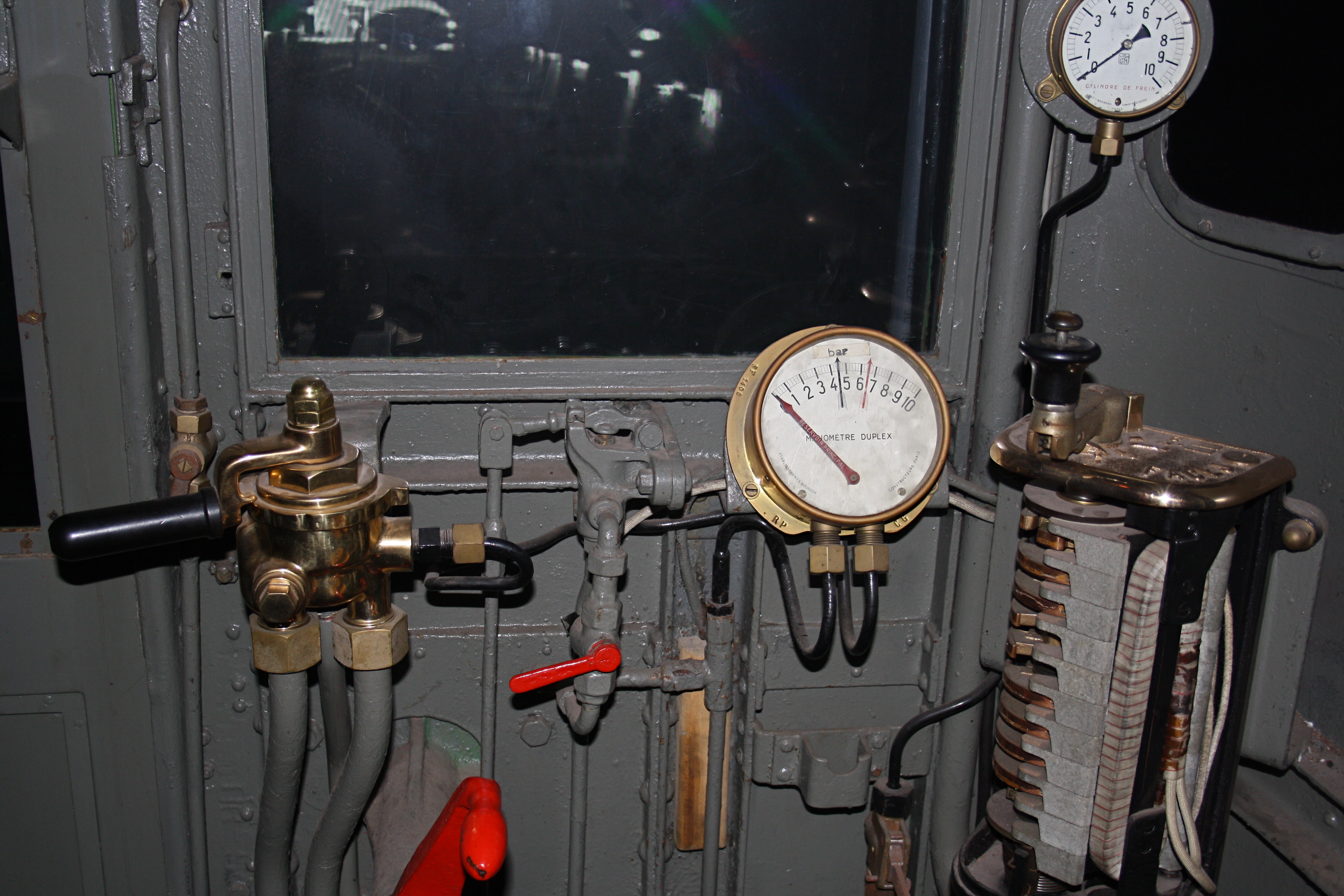 Elements de conduite de la motrice Sprague-Thomson M.1354 exposée à la Cité du Train